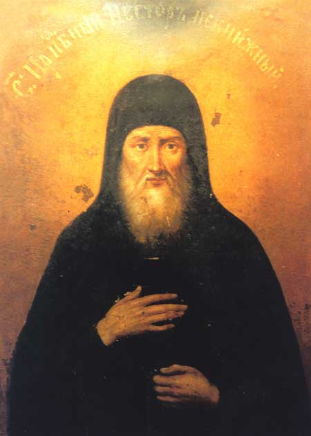 Saint Nestorius of Kyiv Caves. Orthodox saint. Нестор некнижний - XIII-XIV ст. Чернець Печерського монастиря. Преподобний. Пам'ять 10 вересня і 10 листопада. Цей Нестор був названий некнижним на відміну від Нестора Літописця. Він щиро й ревно служив Богові й удостоївся бачити Христа та ангелів під час молитви. Прп. Нестор заздалегідь передбачив день своєї смерті. Його мощі спочивають у Дальніх печерах.